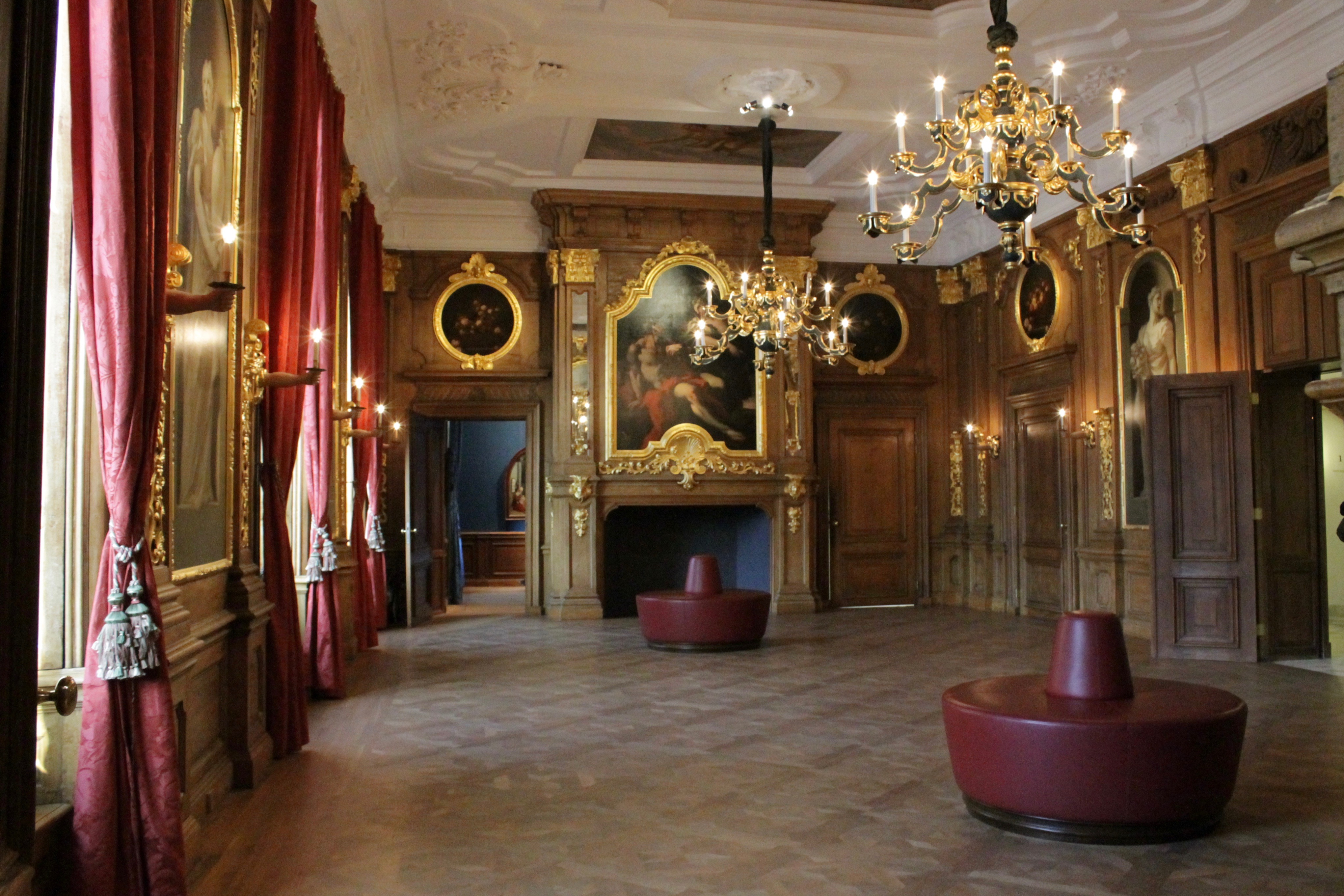 Maurithsuis al interior